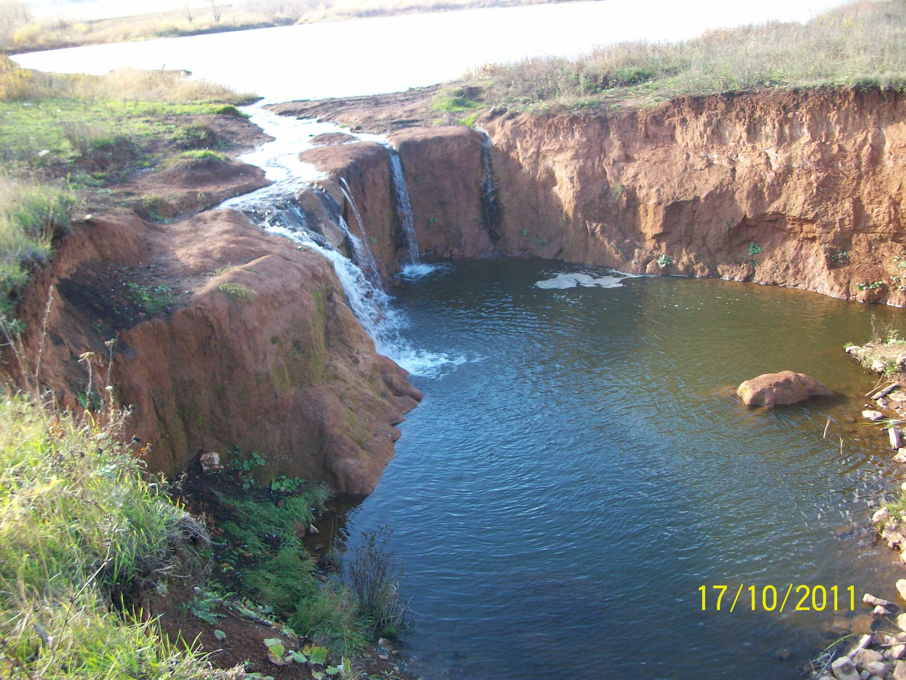 Река Садак в районе с.Матвеевка, Оренбургская область, Россия